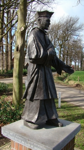 Nedersaksies: Beeldjen bi'j 't Klooster.